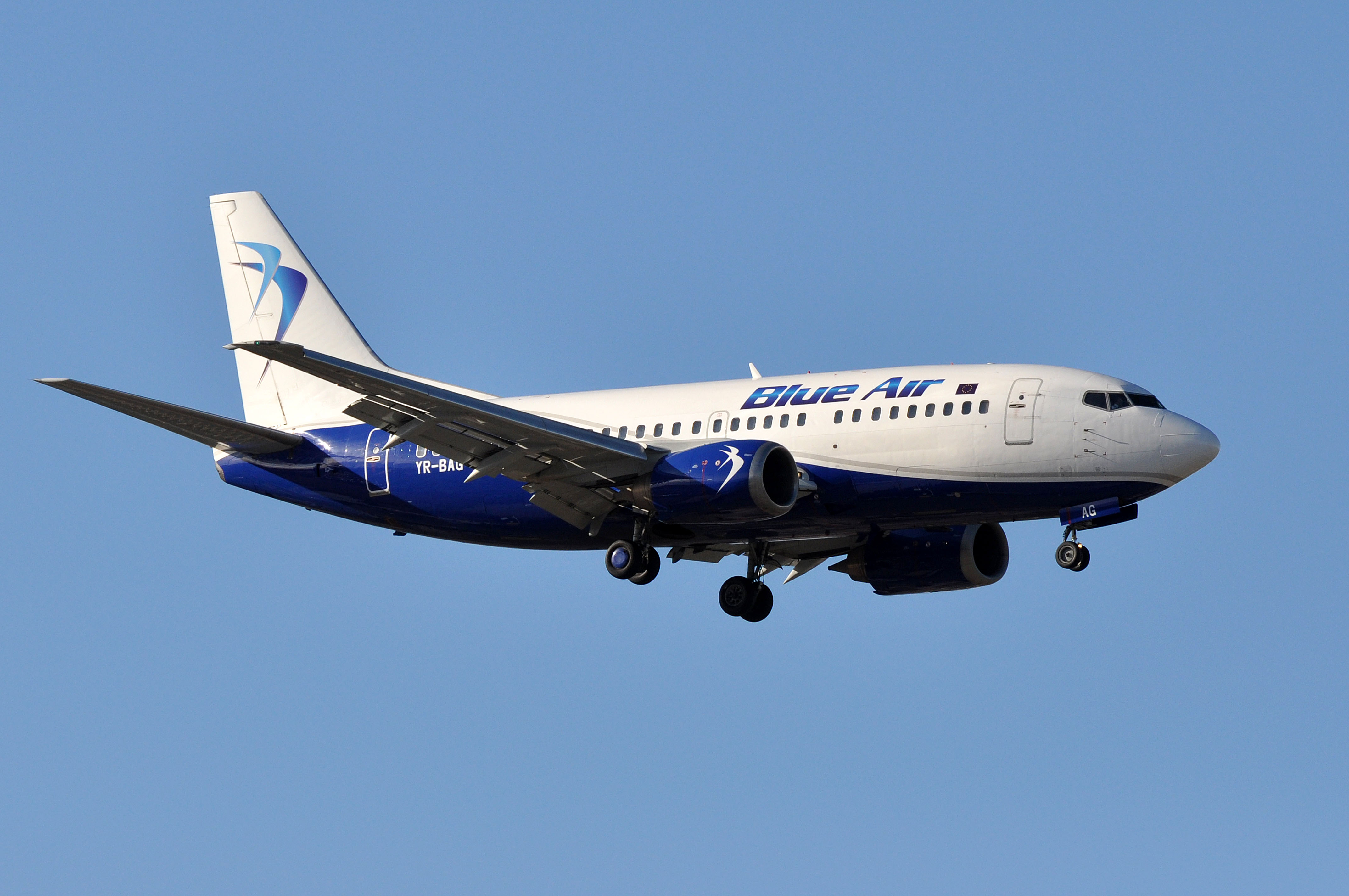 MSN 24778 LN 1816 B737-5L9 / 737 / 737-500 BLUE AIR FCO AIRPORT EX MAERSK AIR / AIR MALTA / STERLING AIRLINES / JET TIMES AS OY-MAA / ASIANA AIRLINES AS HL7230 / BRITISH AIRWAYS AS G-MSKD / ESTONIAN AIR ES-ABF